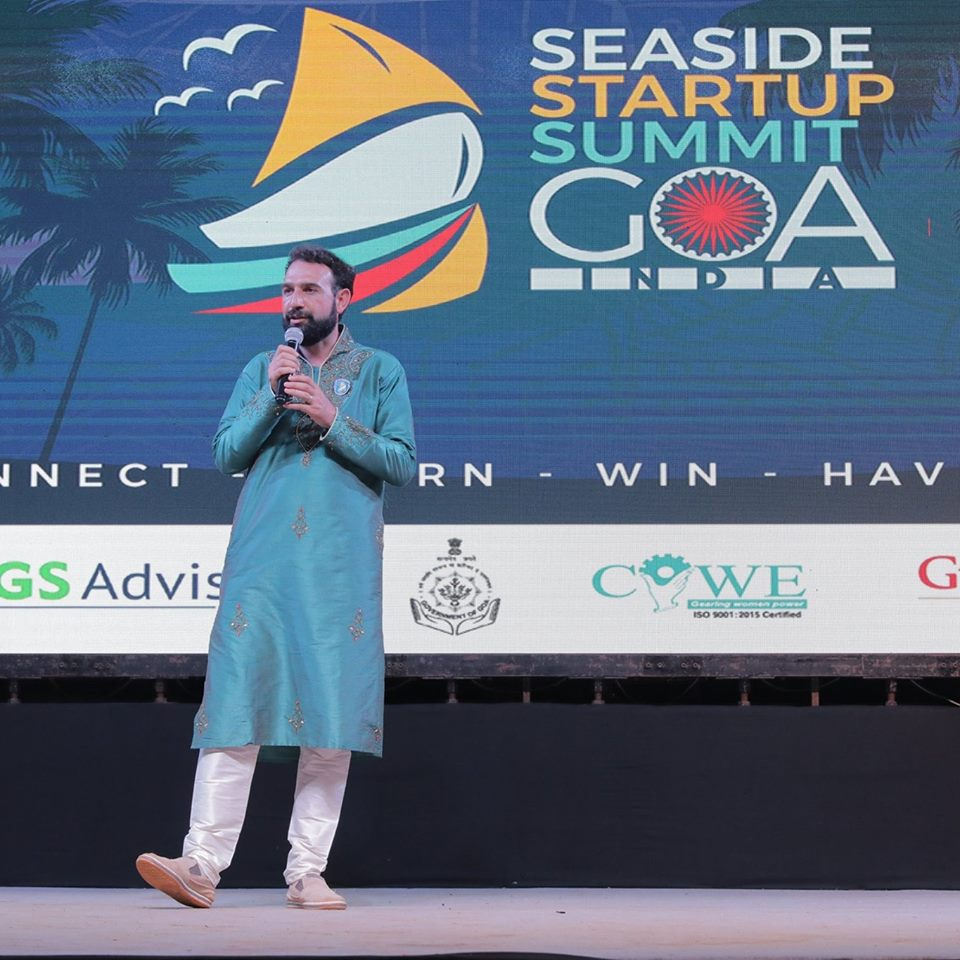 Հակոբ Հակոբյանը Seaside Startup Summit GOA միջոցառման ժամանակ